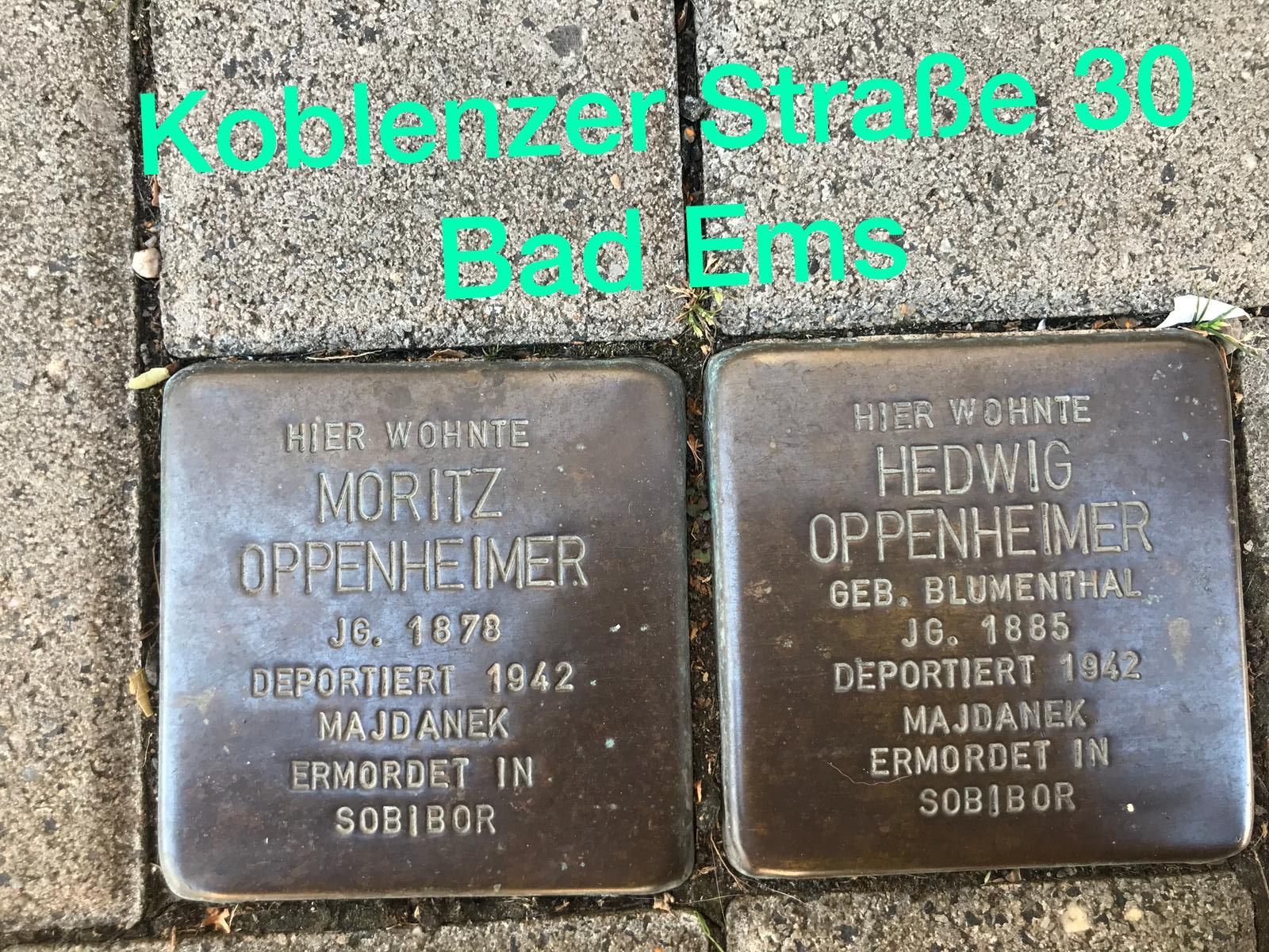 StolpersteinBadEmsKoblenzerStraße30